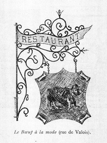 L'enseigne de la maison Le bœuf à la mode rue de Valois à Paris (époque Directoire).